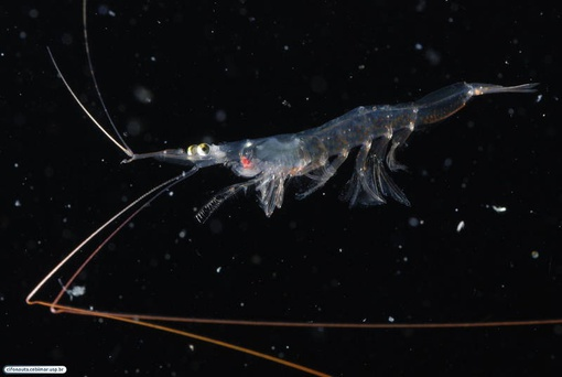 camarão da família Sergestidae, superfamilia Sergestoidea